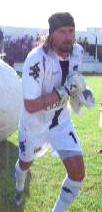 MAtías Giordano, en la salida a la cancha en el partido del 22 de noviembre de 2009 ante Central Córdoba, en Santiago del Estero